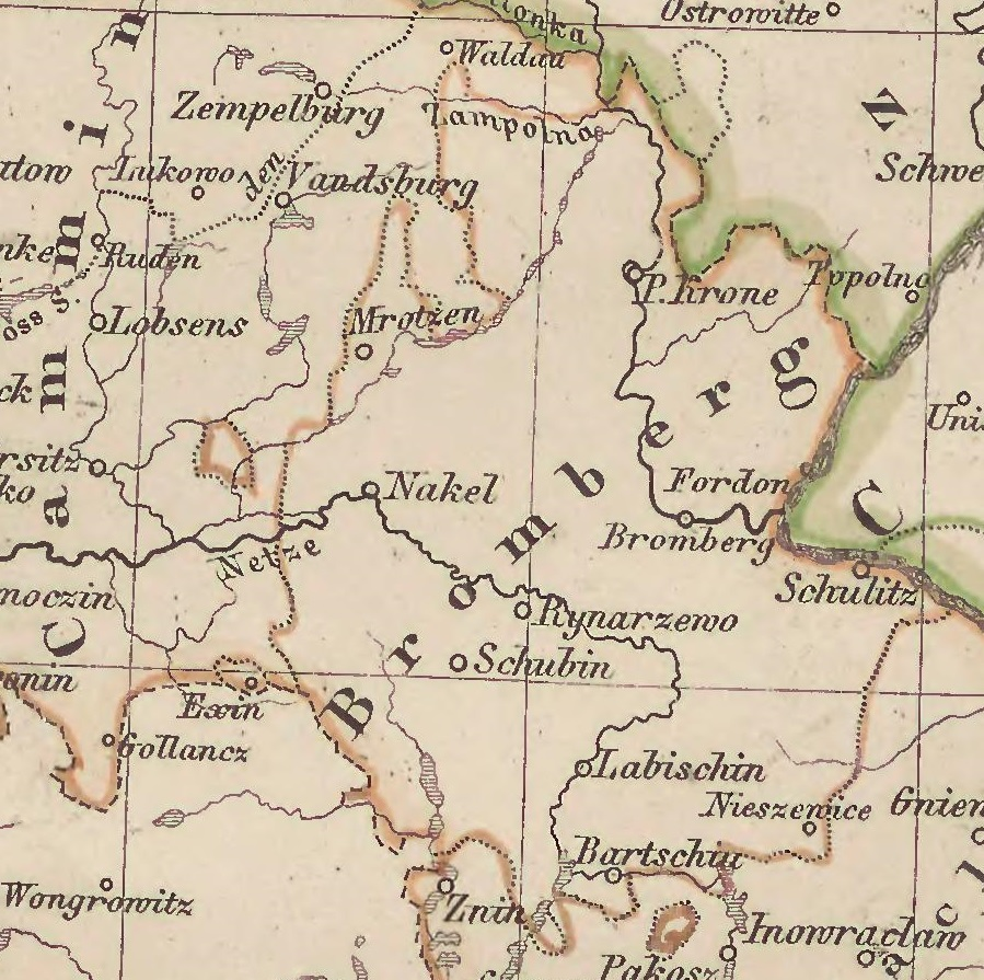 Kreis Bromberg von 1772 bis 1818